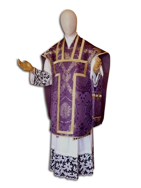 Pianeta romana Paolo V, in lampasso di seta violacea broccato in oro, in replica dai tessuti originali del parato di Paolo V Borghese custoditi presso il Sacello Apostolico